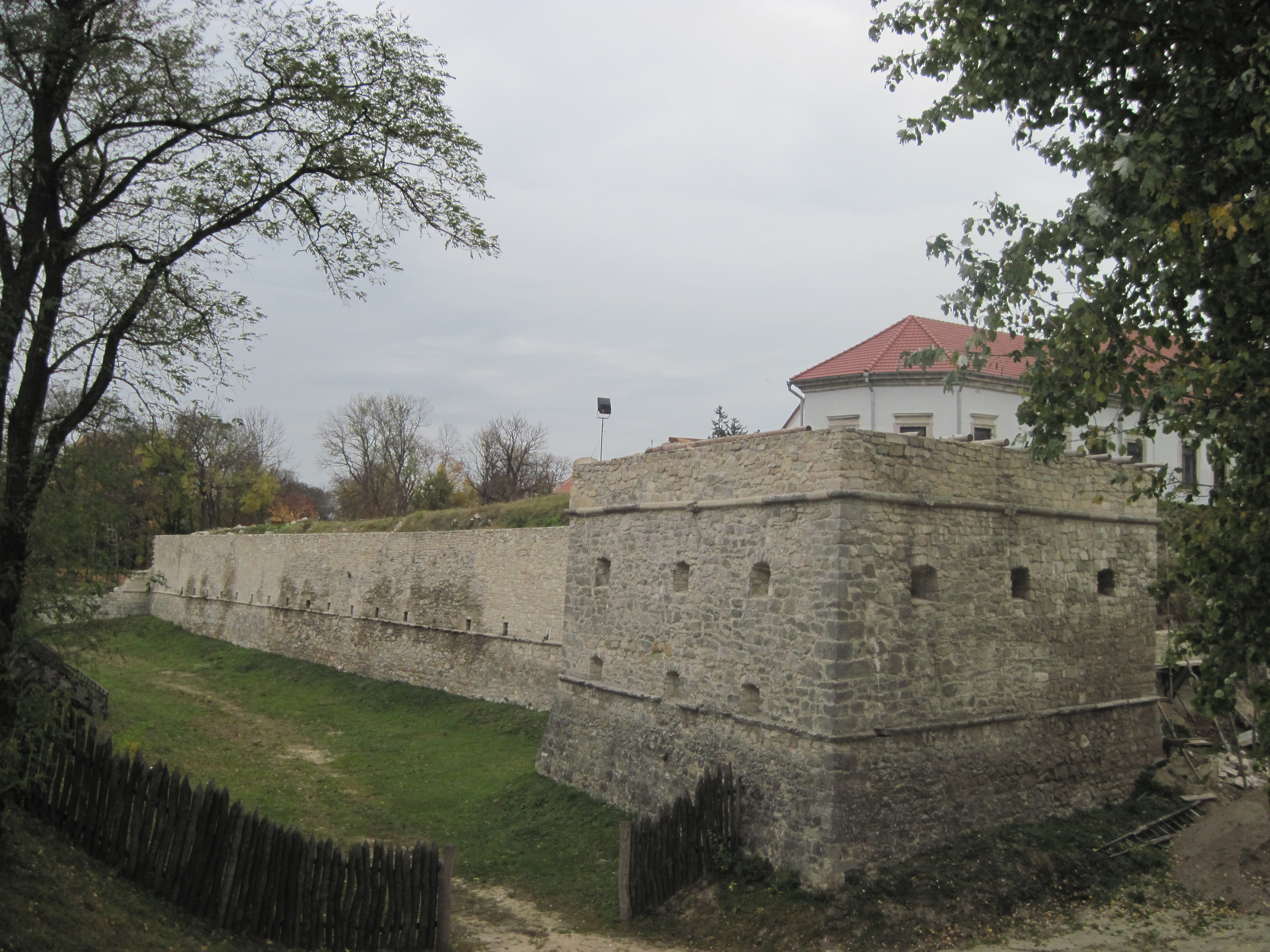 Збаразький замок